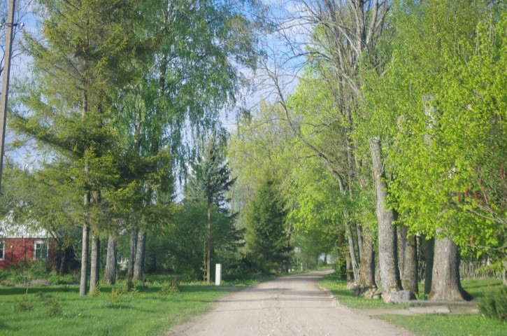 Juodonių kaimas (Rokiškio raj.)